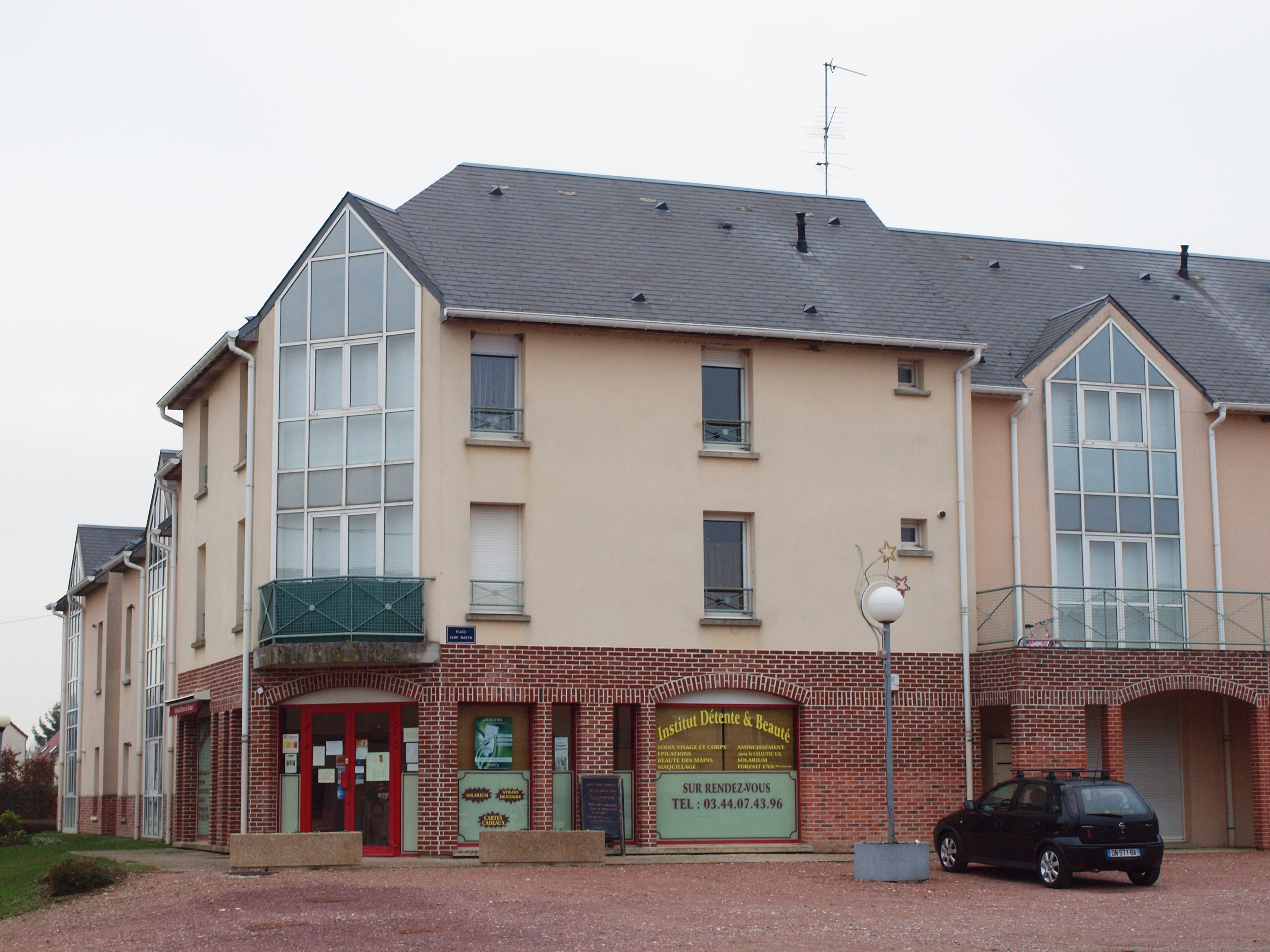 Rochy-Condé (Oise, France)